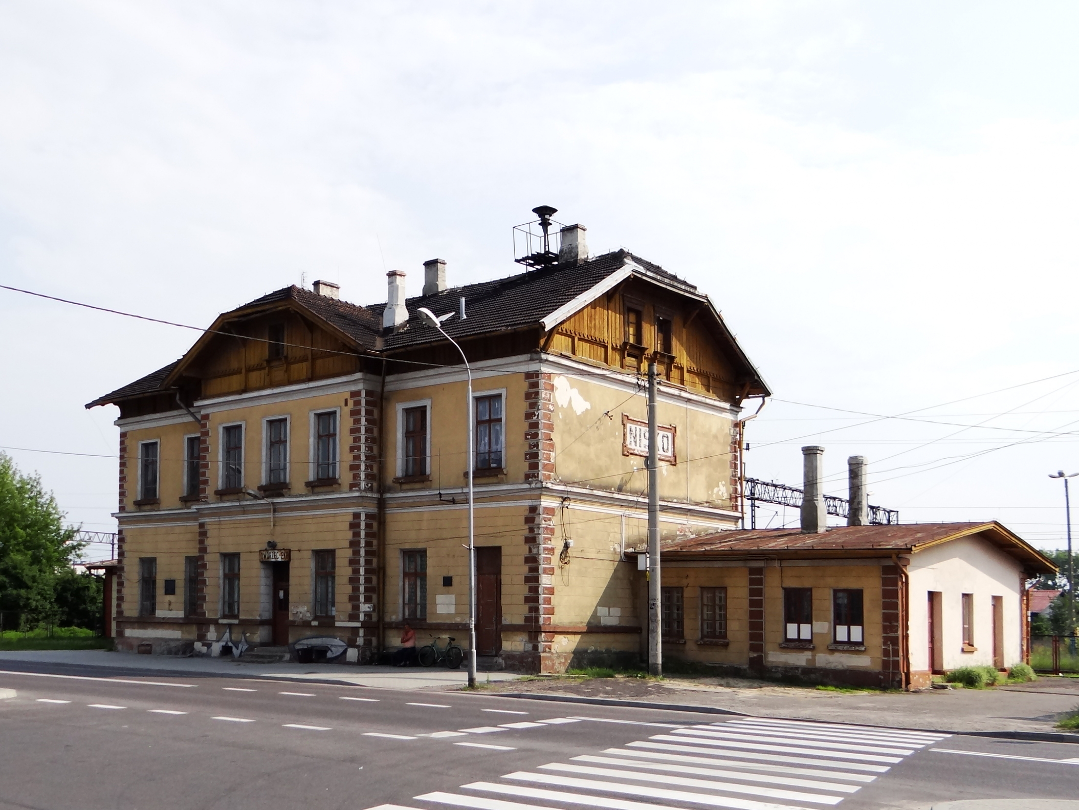 Zdjęcie wykonane w miejscowości Nisko.